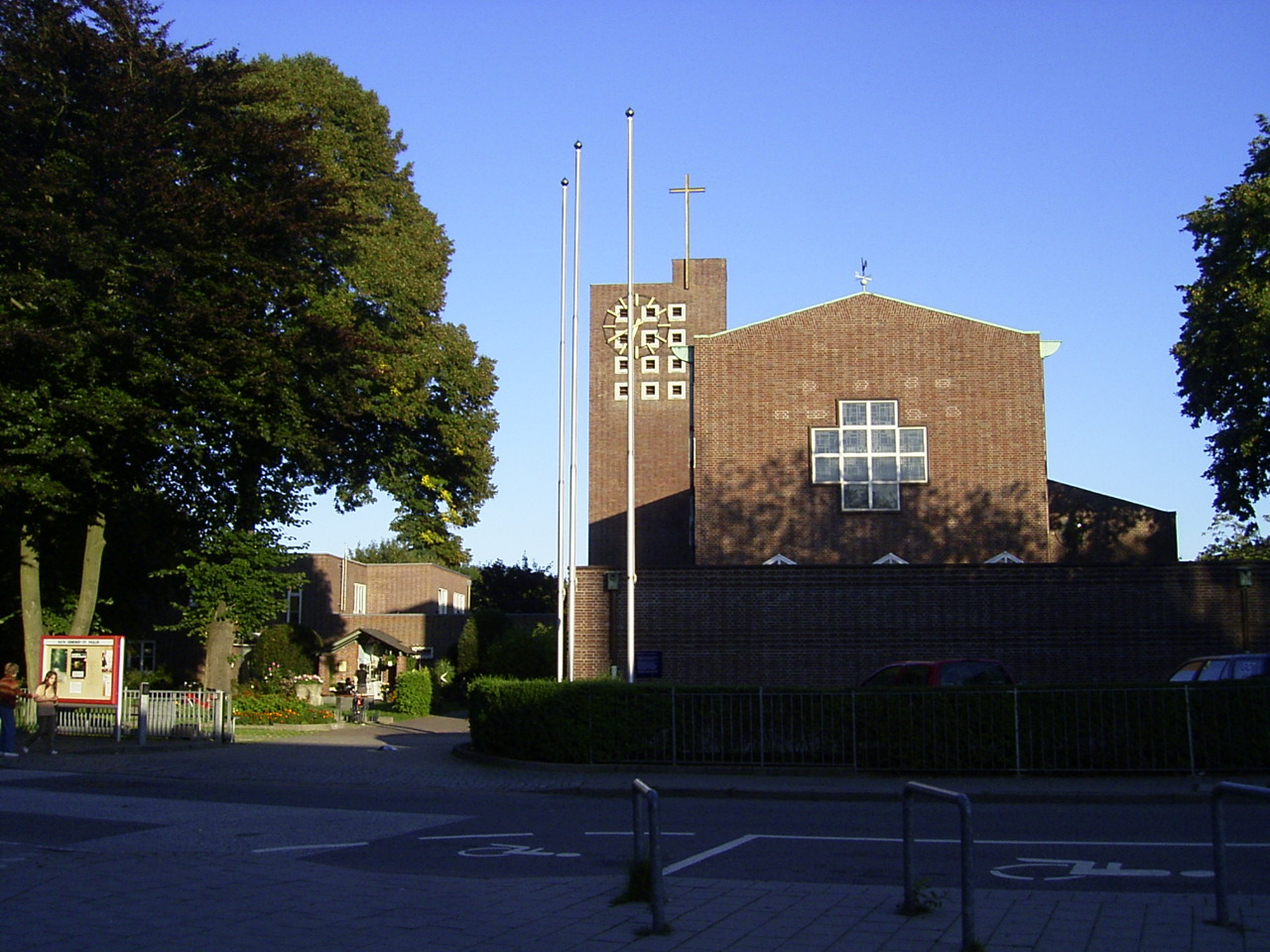 Römisch-katholische St.Paulus-Kirche in Billstedt